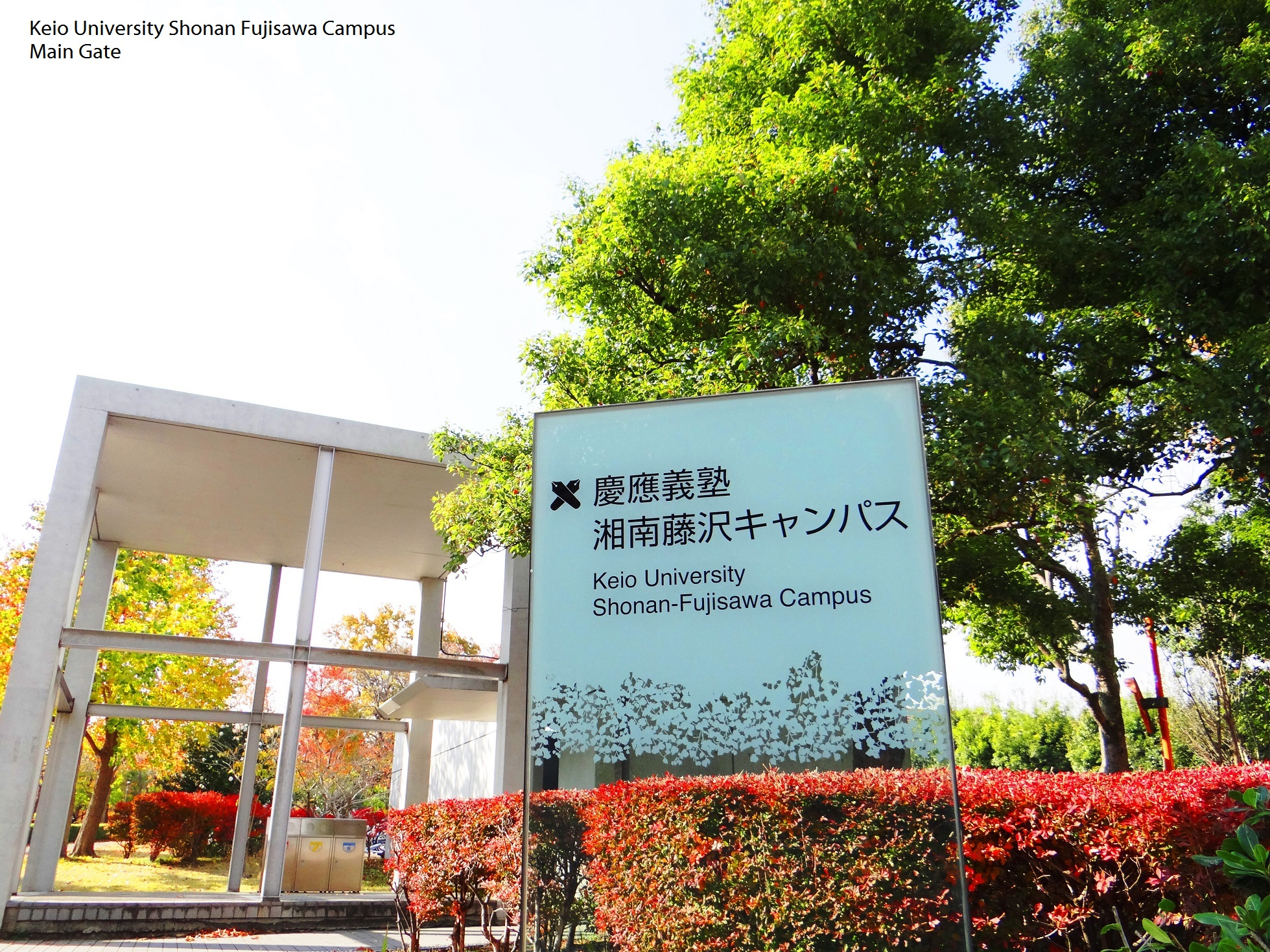 Keio University SFC Main Gate